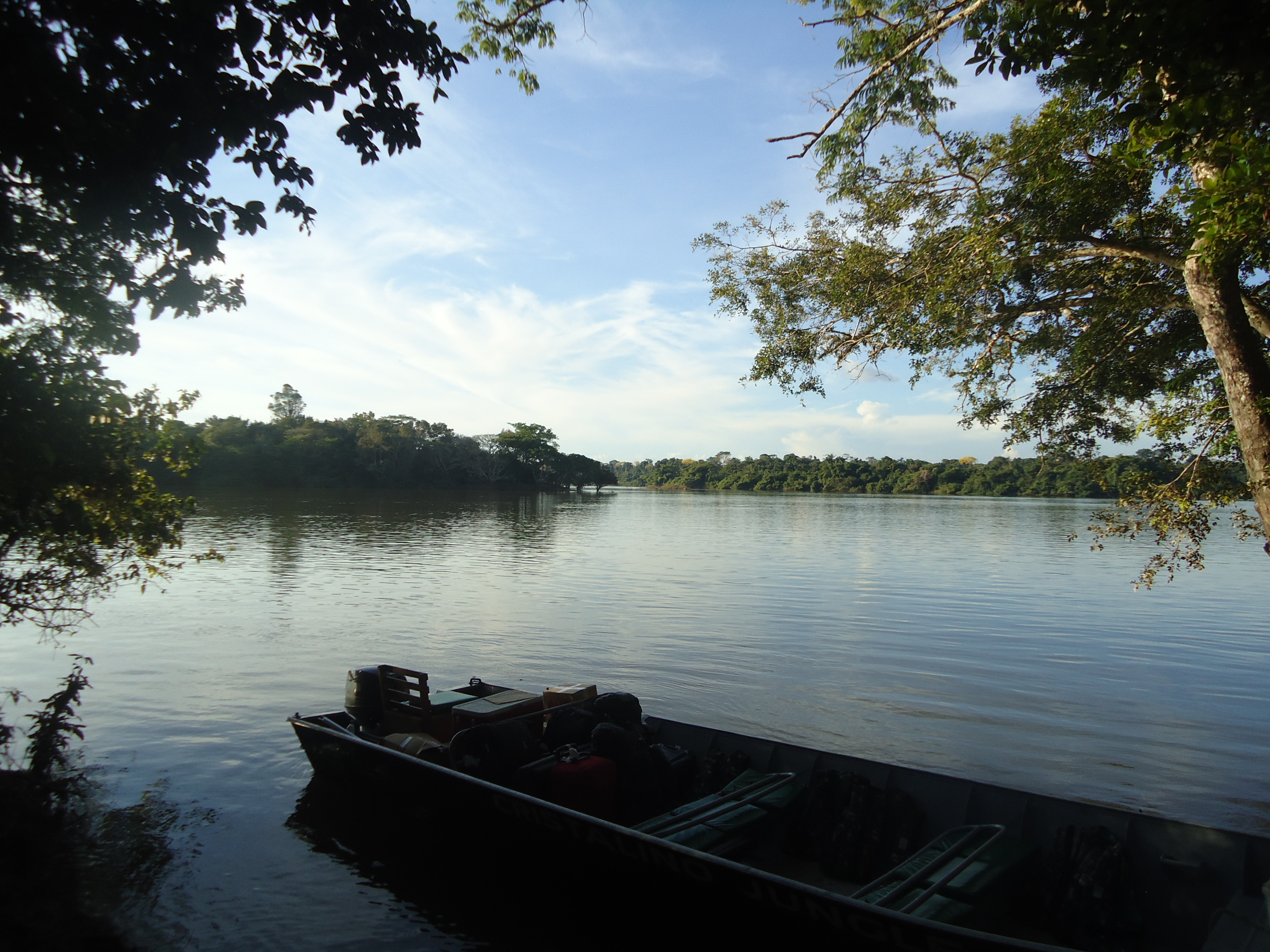 Caminho para a RPPN Cristalino - MT